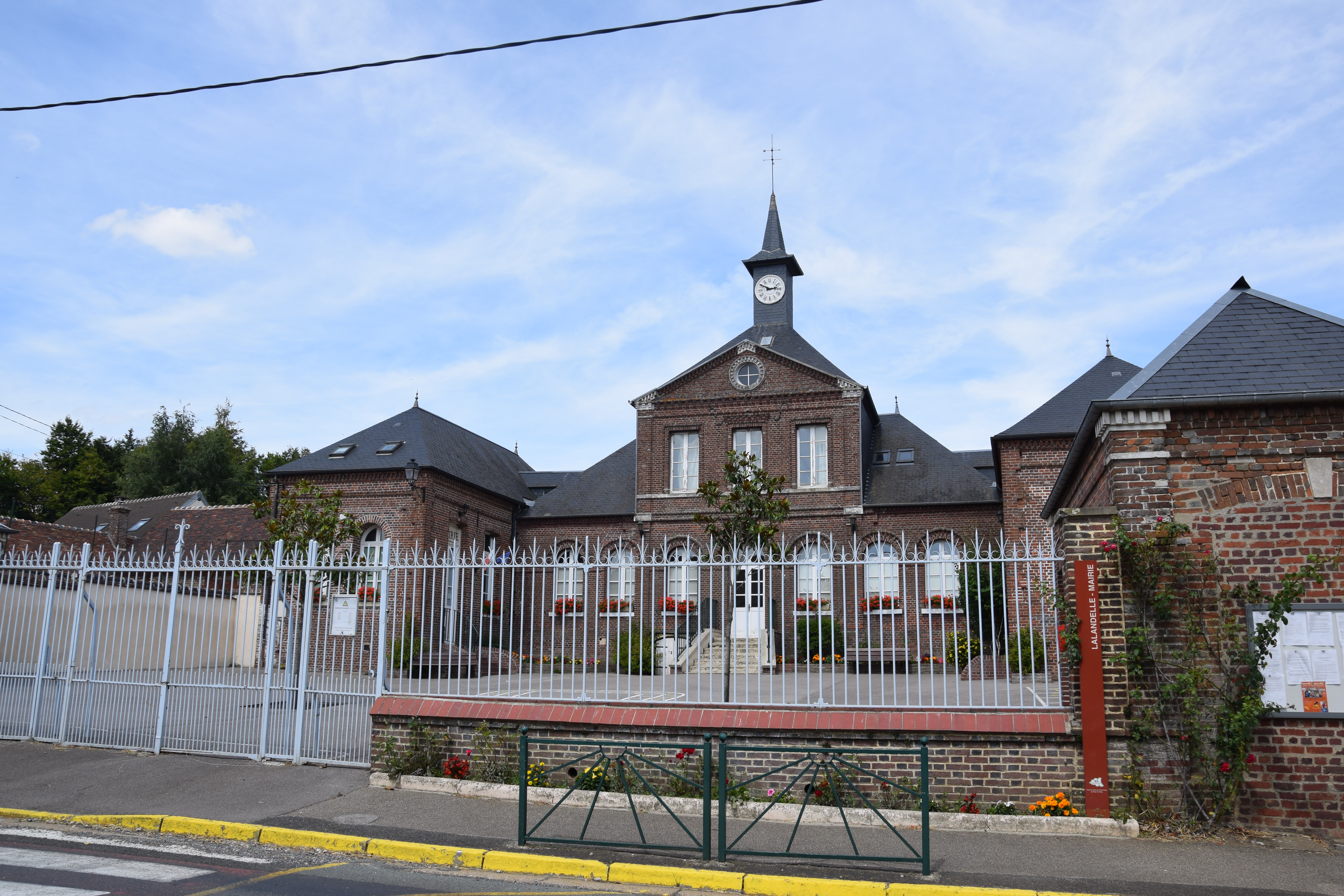 Lalandelle